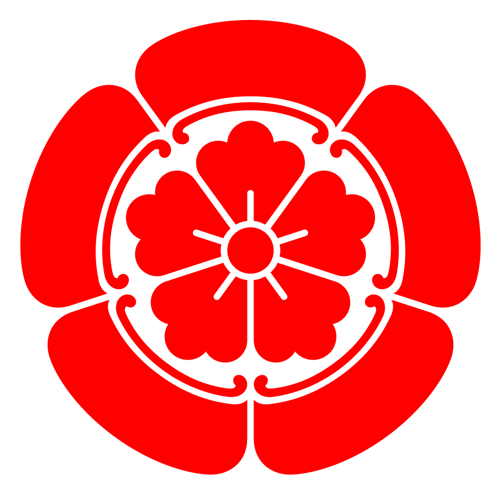 五瓜紋の一種「織田木瓜」。「五瓜に唐花」に酷似する。織田信長で有名な、尾張織田弾正忠家の家紋。